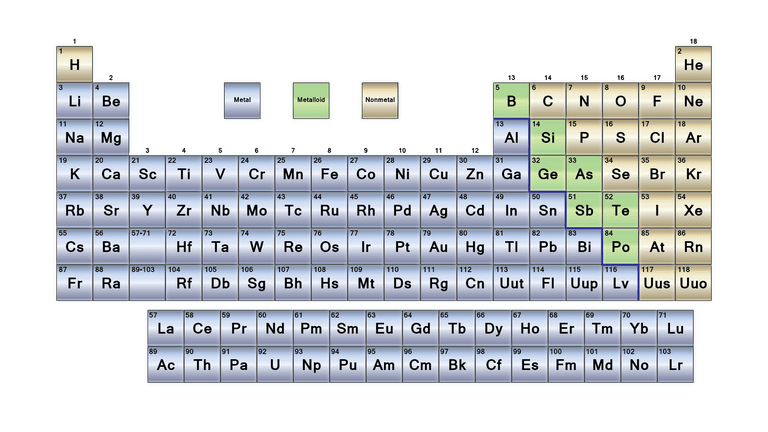 Taula periodikoan azaltzen diren metalak.